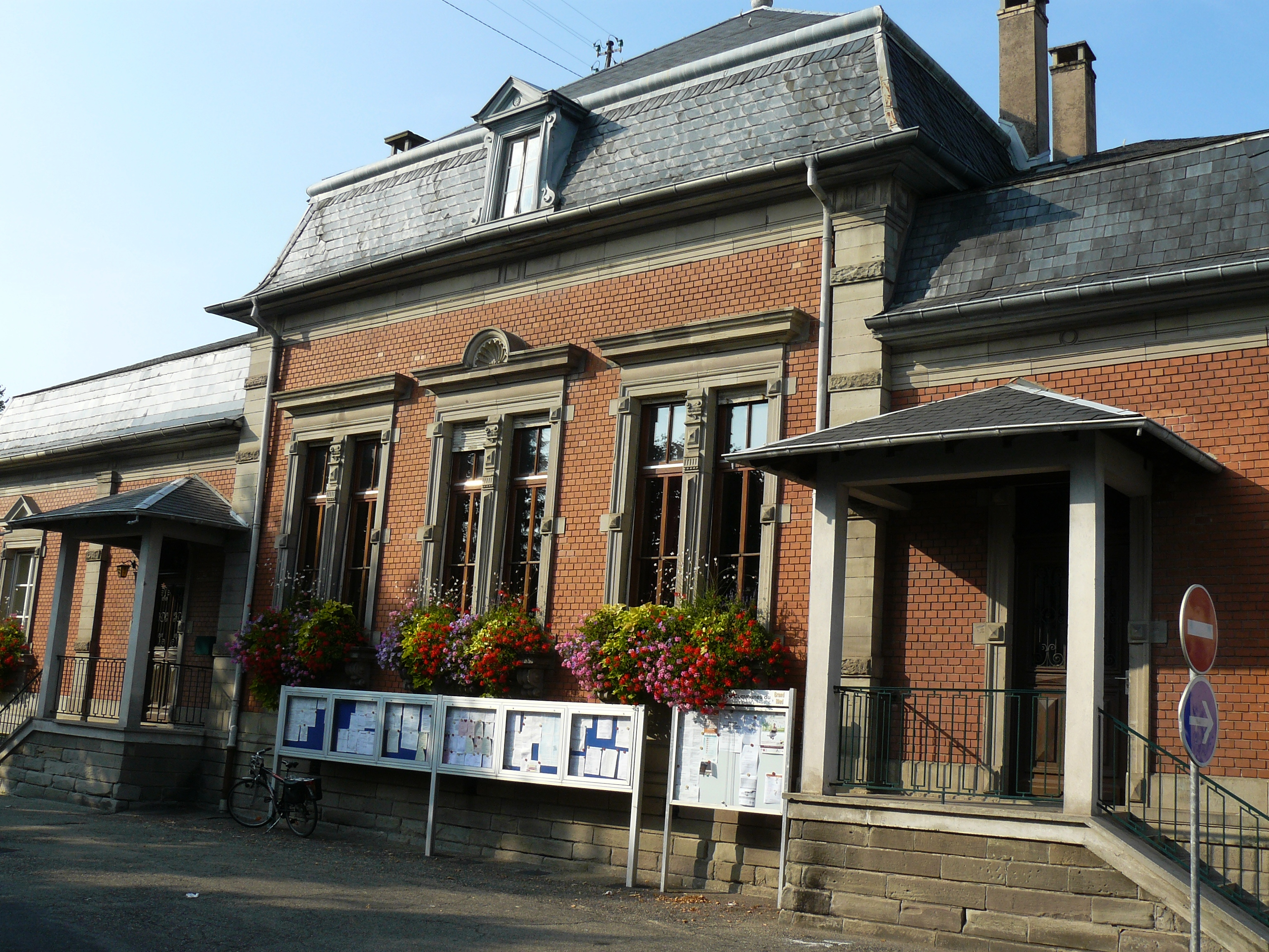 Mairie de Hisenheim